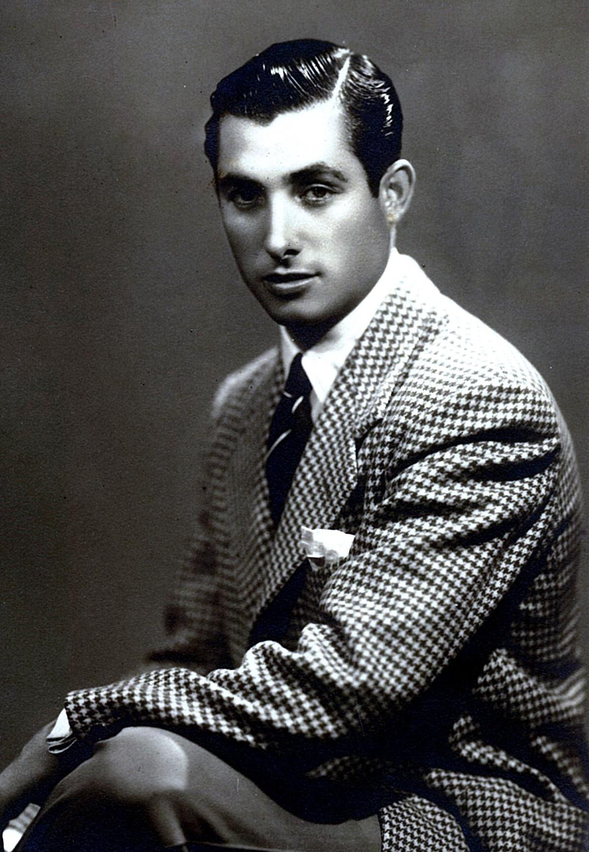 Retrato Pepín Martín Vázquez. Madrid, 1945